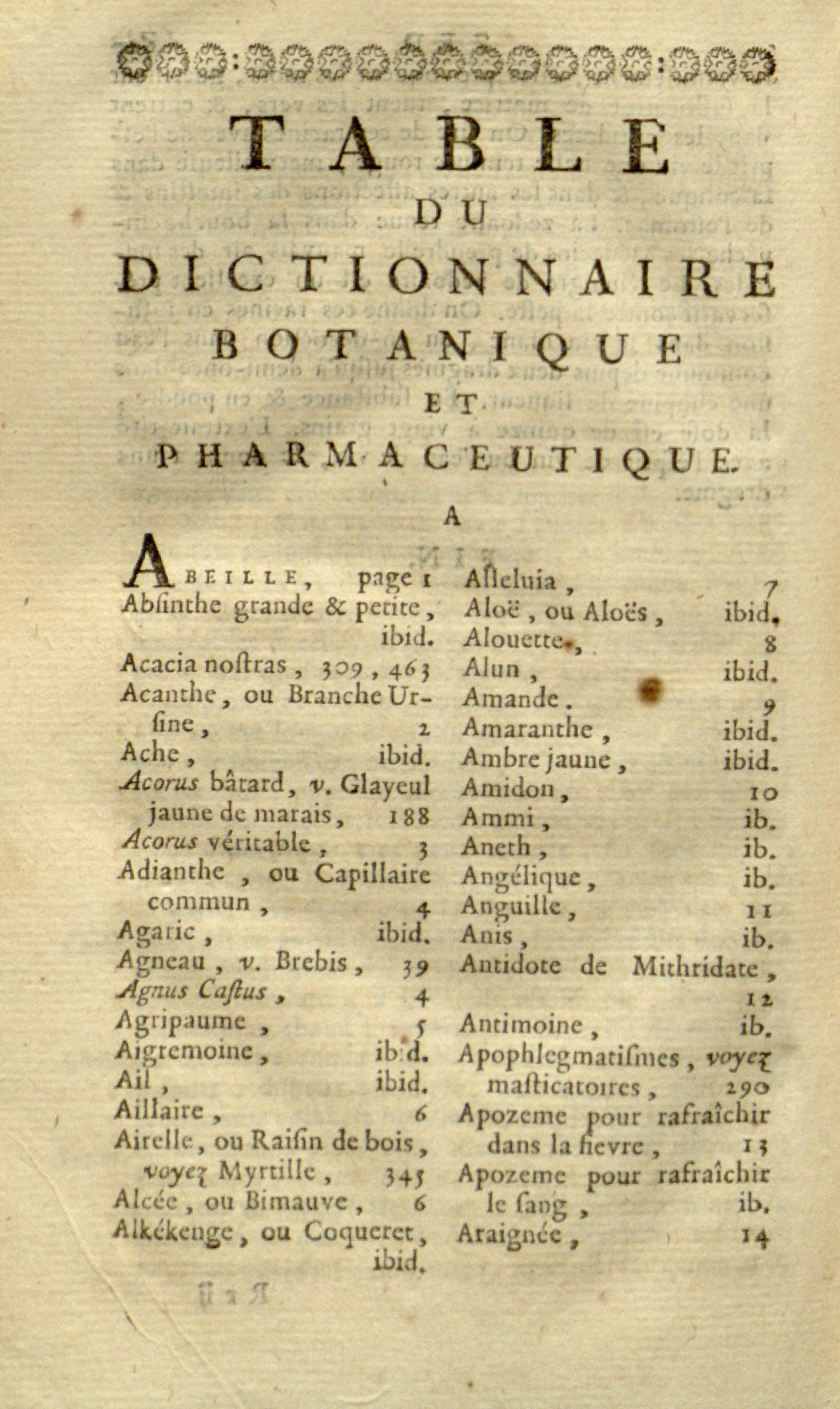 Dictionnaire botanique et pharmaceutique, contenant les principales propriétés des minéraux, des végétaux, et des animaux d'usage aves les préparations de pharmacie...par***.